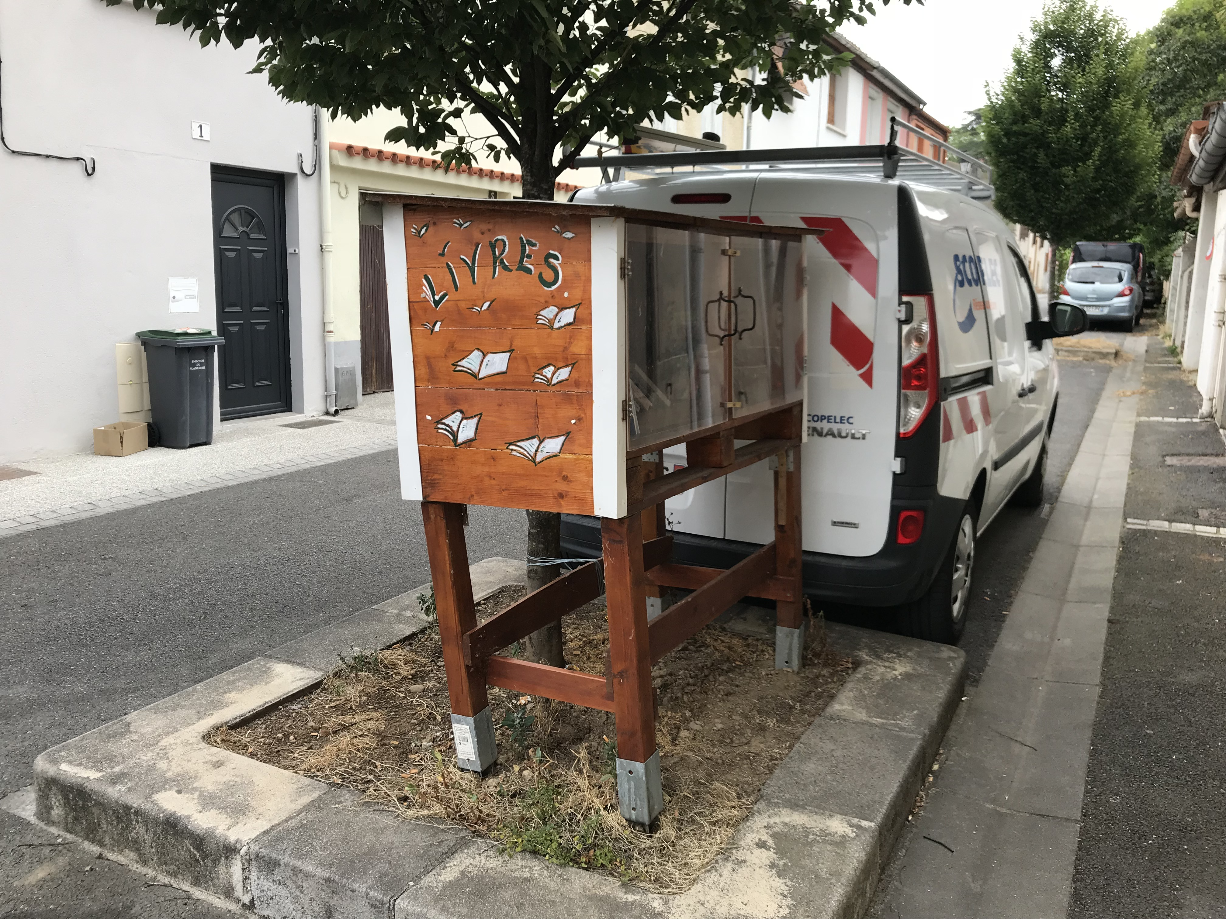 Boîte de livre dans le centre ville de Pamiers